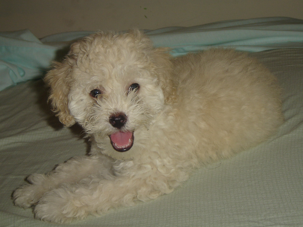 Un caniche cachorro llamado Willy